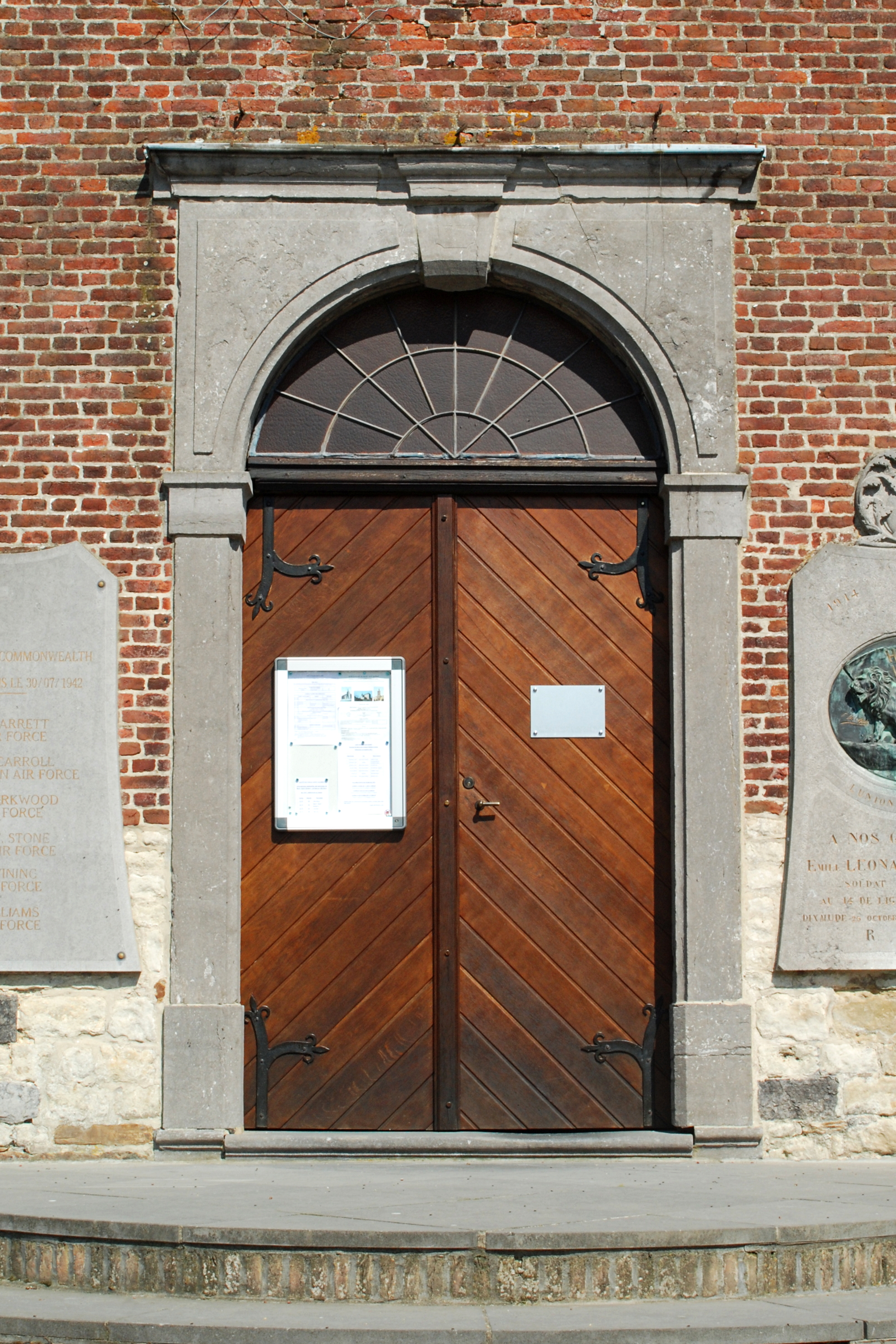 Belgique - Brabant wallon - Mont-Saint-Guibert - Église Saint-Pierre de Corbais (classique, 1773)